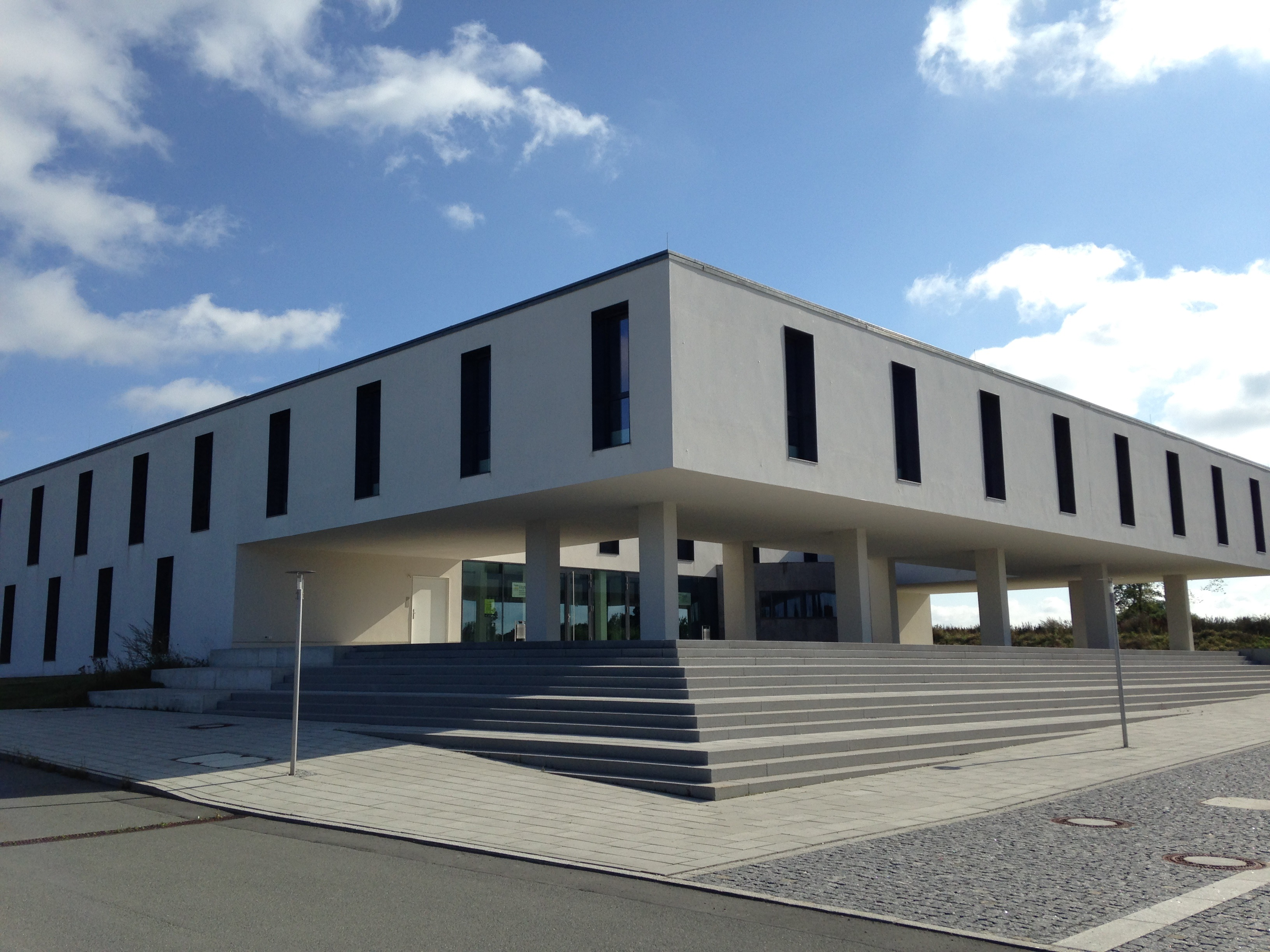 Institut für Informationssysteme der Hochschule Hof - iisys